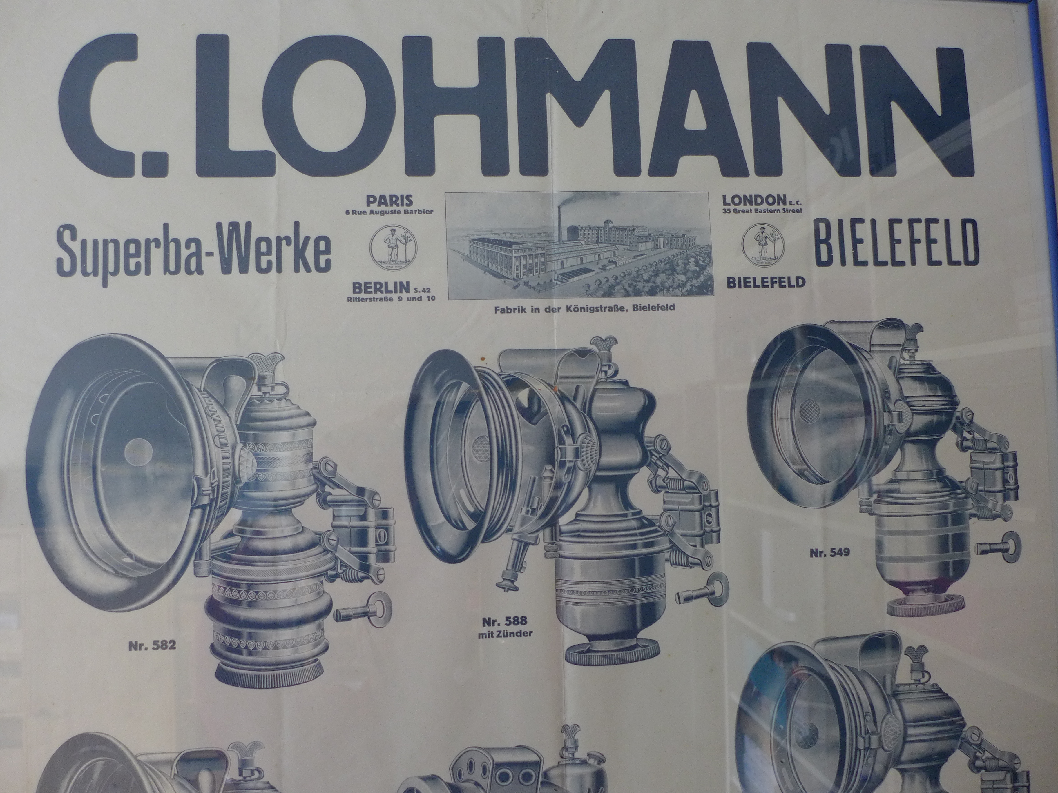 Altes Plakat der Laternen Produktion